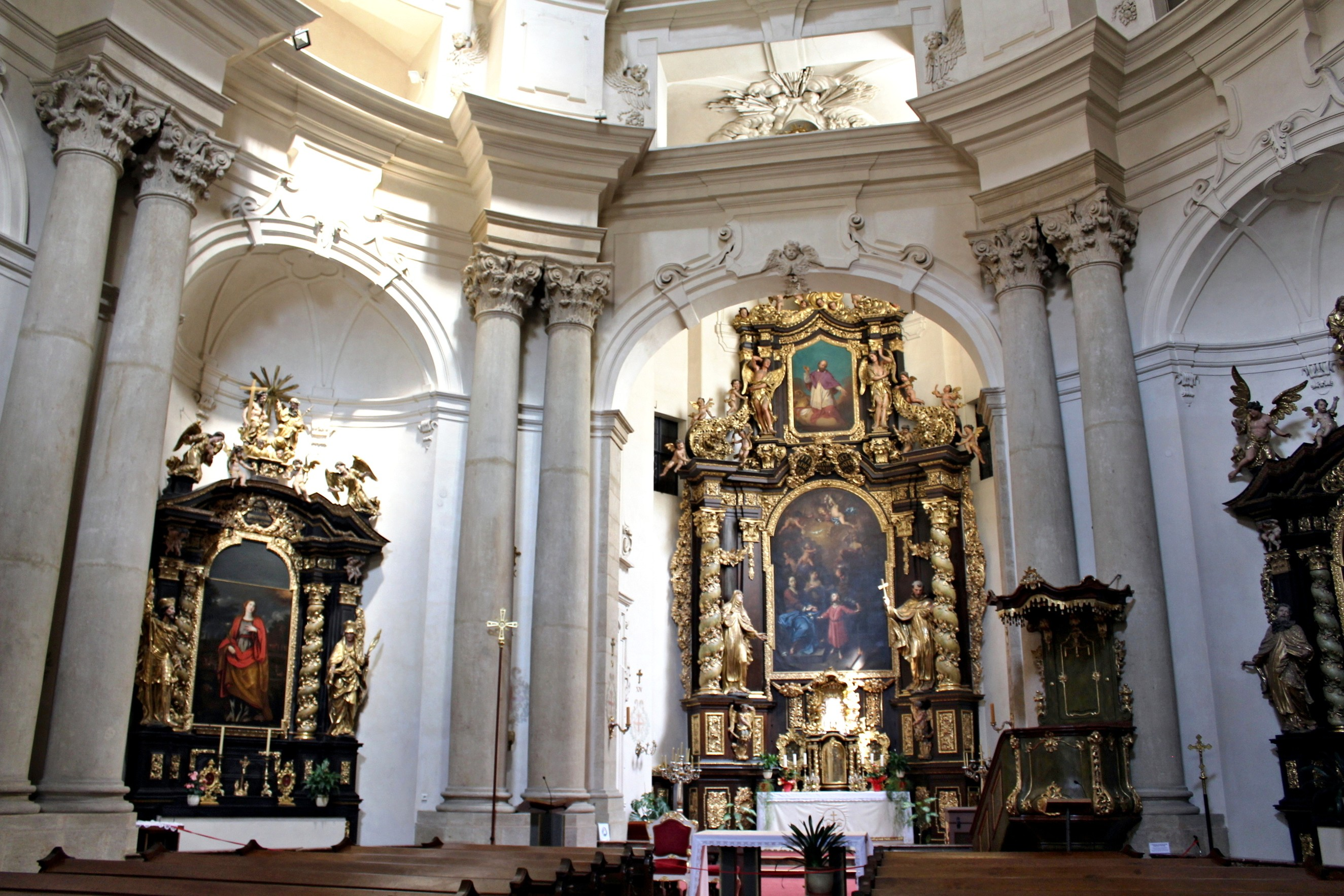 Praha 1-Malá Strana, kostel sv. Josefa